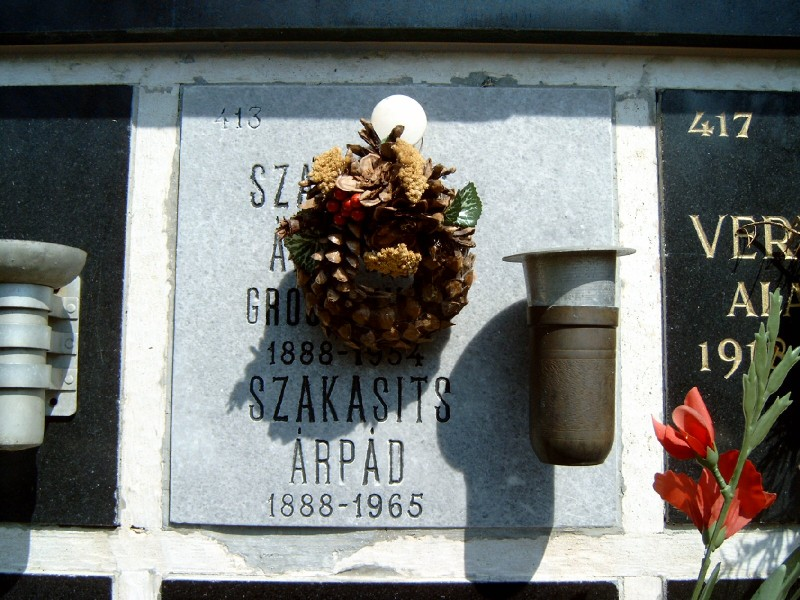 Szakasits Árpád (Bp., 1888. dec. 6. – Bp., 1965. máj. 3.) újságíró, miniszter, köztársasági elnök sírja Budapesten. Farkasréti temető: 612/2-413.fülke.